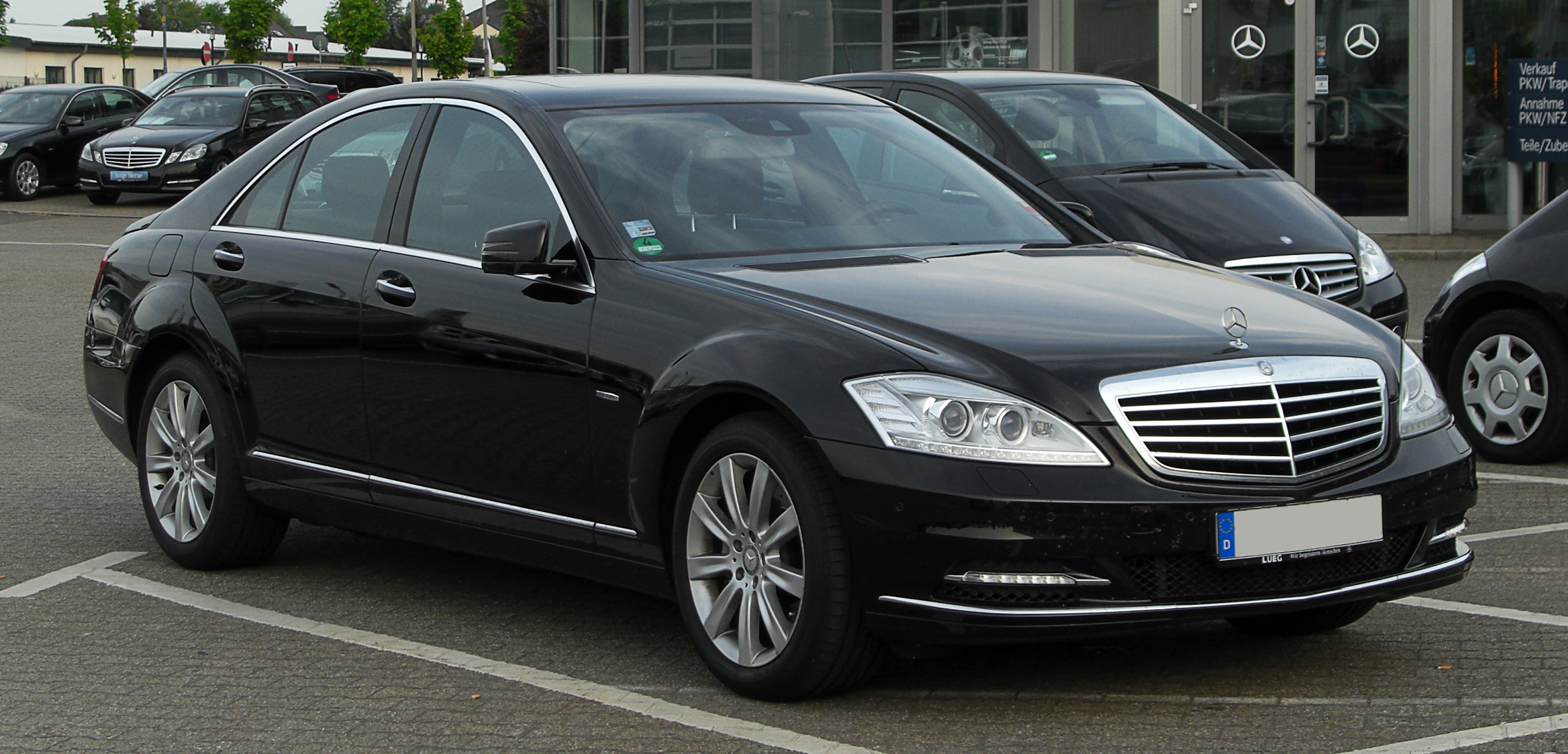 Mercedes-Benz S 350 CDI BlueEFFICIENCY 4MATIC (W 221, Facelift)